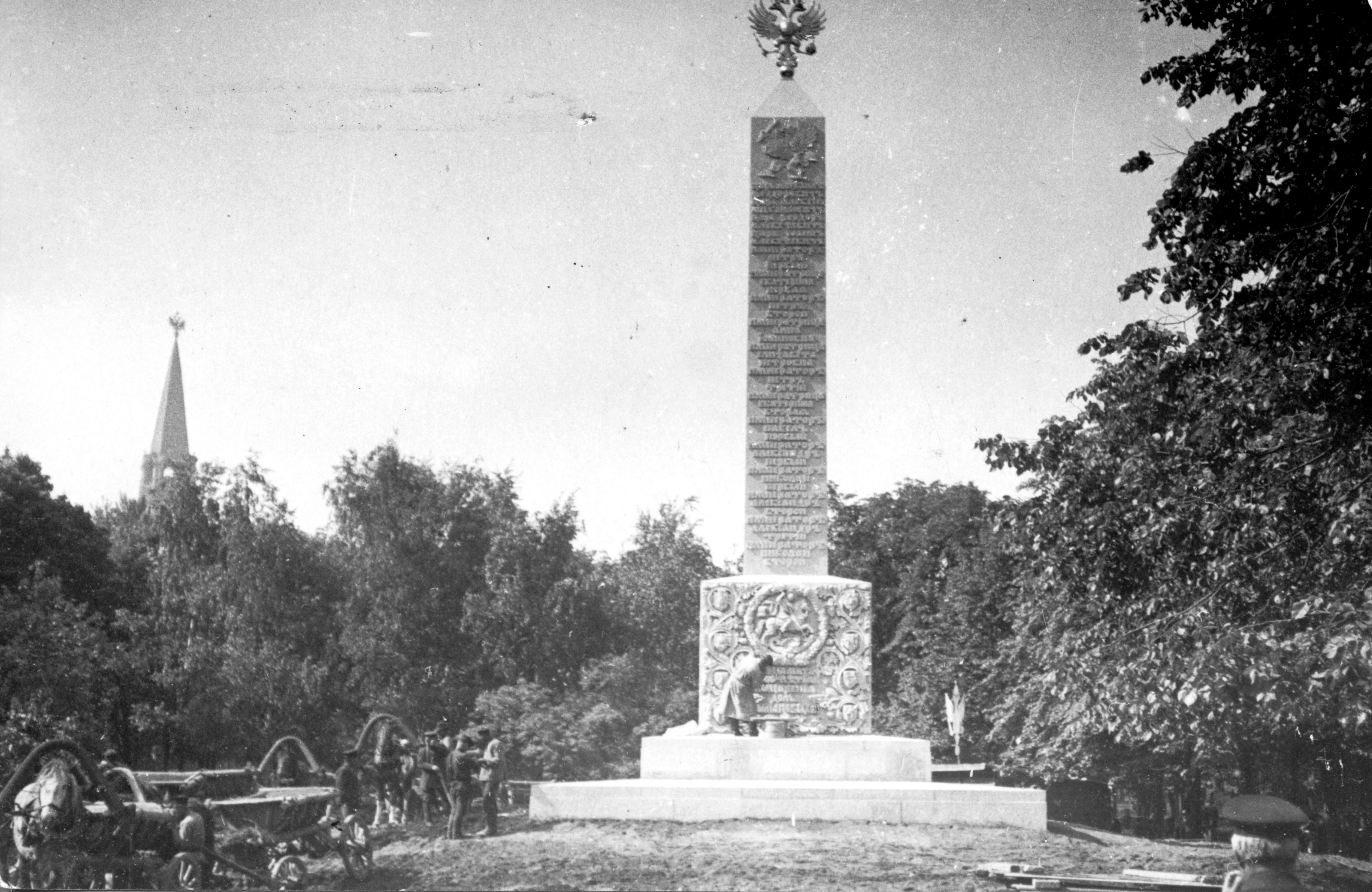 Романовский обелиск в Александровском саду в момент создания. 1914